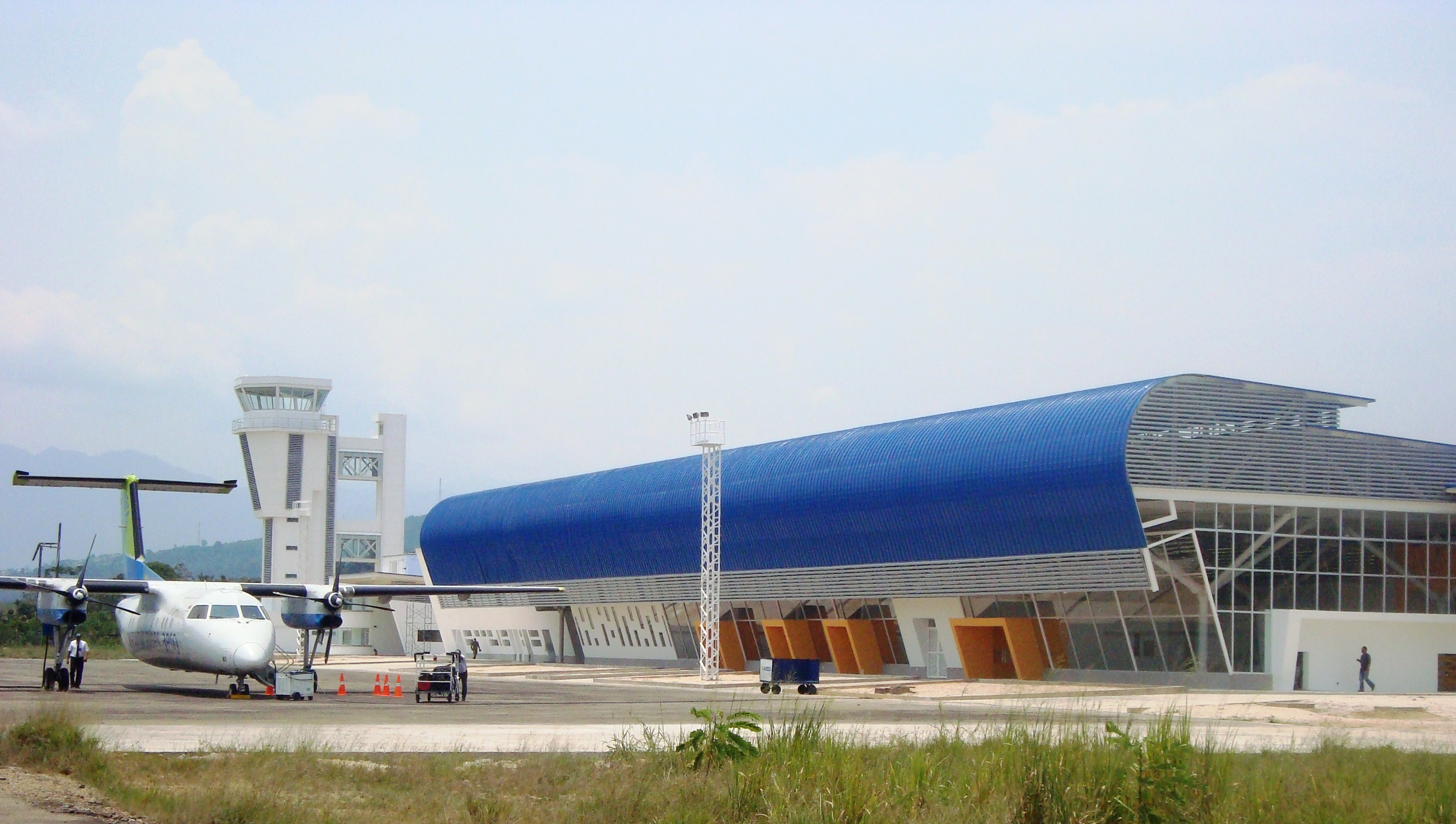 Nuevo terminal de pasajeros y torre de control del aeropuerto Gustavo Artunduaga Paredes de Florencia (Caquetá).